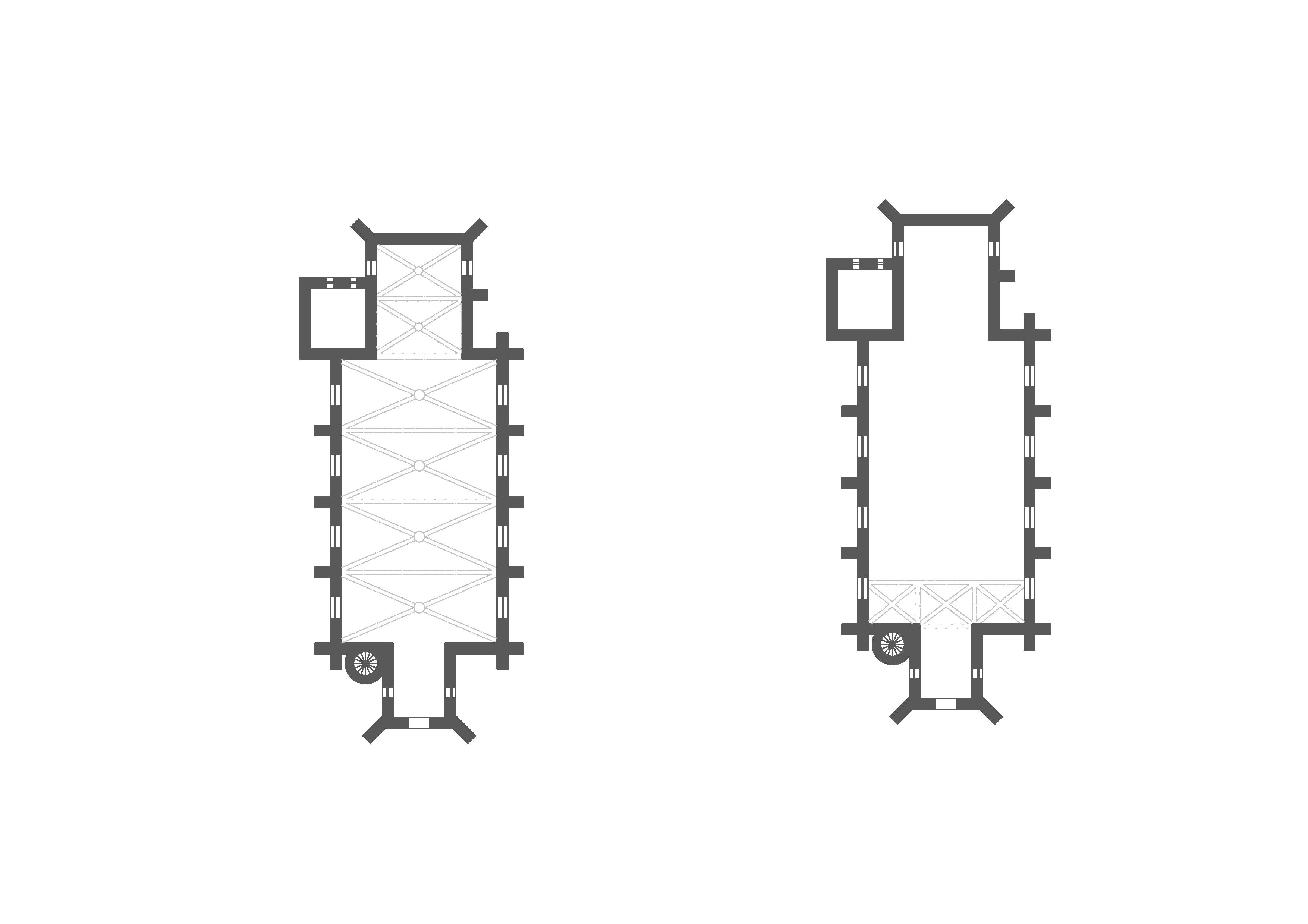 kostel Nejsvětější Trojice v Suché